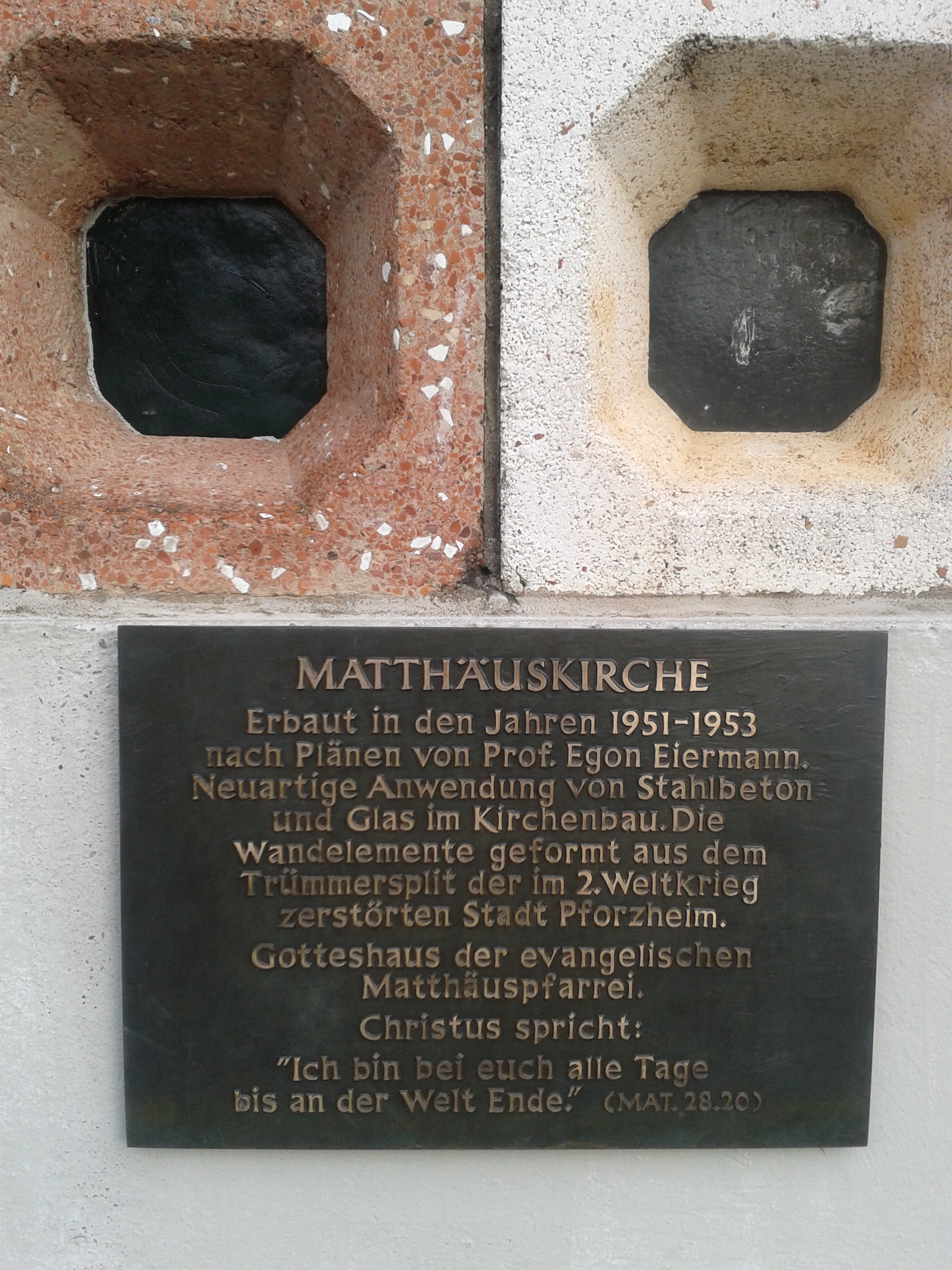 Eiermann Pforzheim Tafel am Eingang